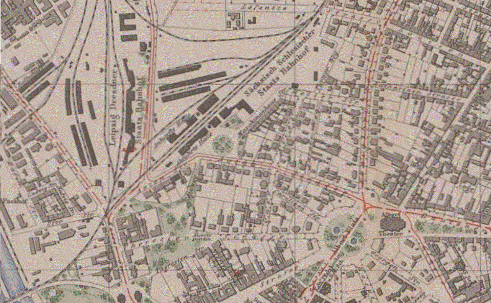 Stadtplanausschnitt von 1894: Deutlich erkennbar ist die gegenüber heute veränderte Führung der Straßen im Bereich des heutigen Neustädter Bahnhofes